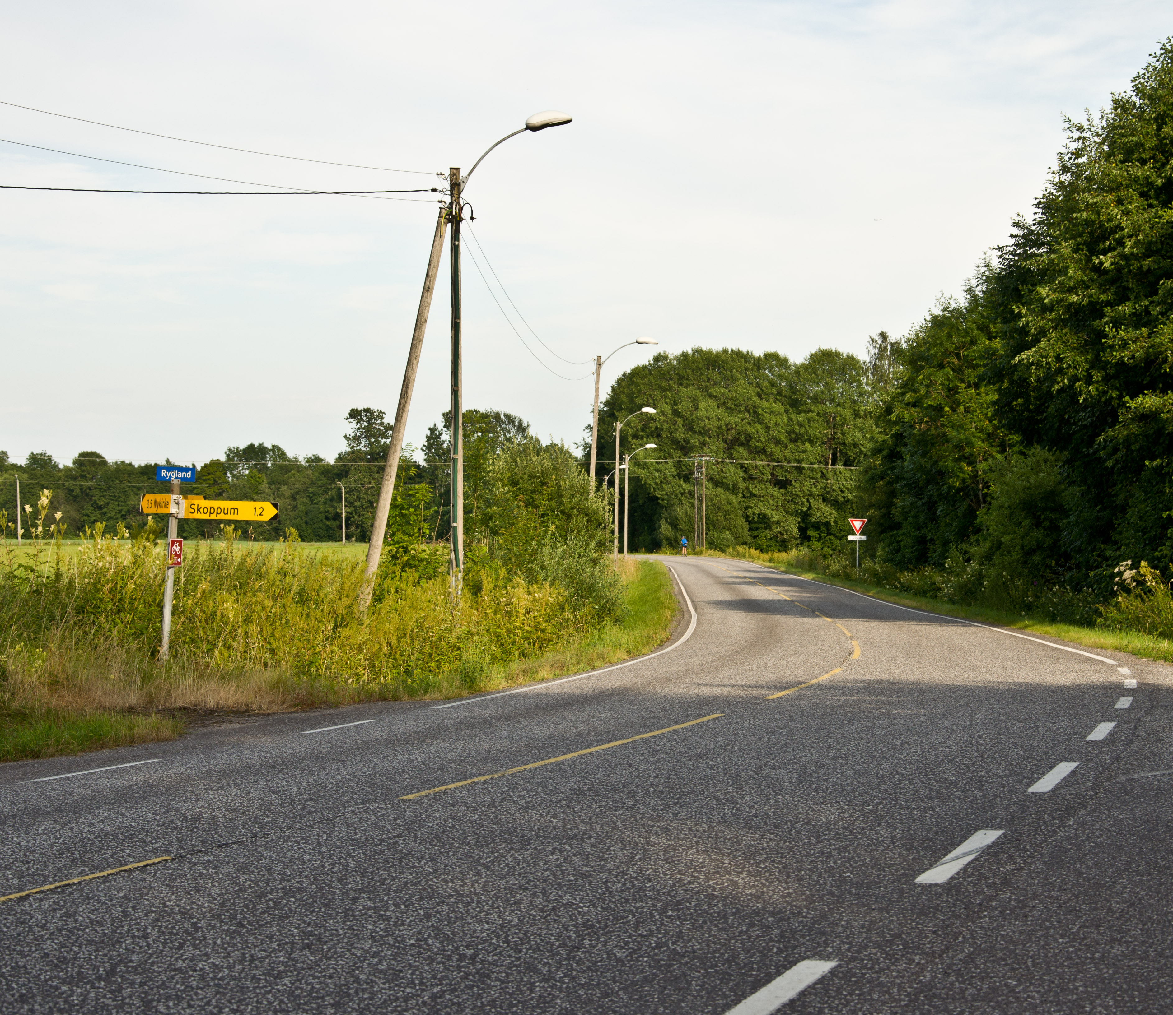 Fylkesvei 670, Horten